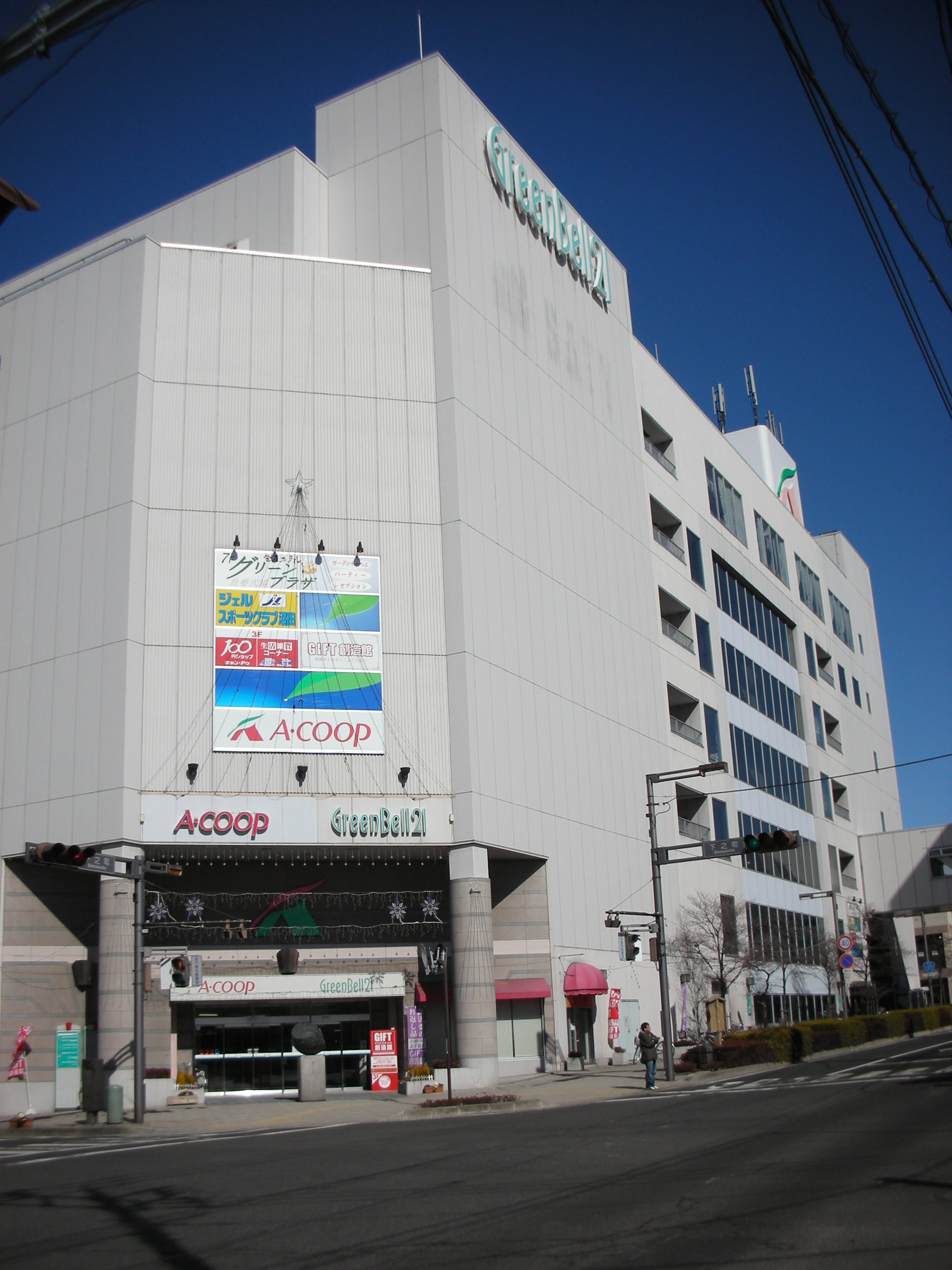 グリーンベル21の外観